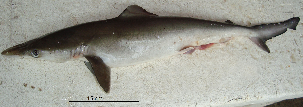 бразильская длиннорылая акула